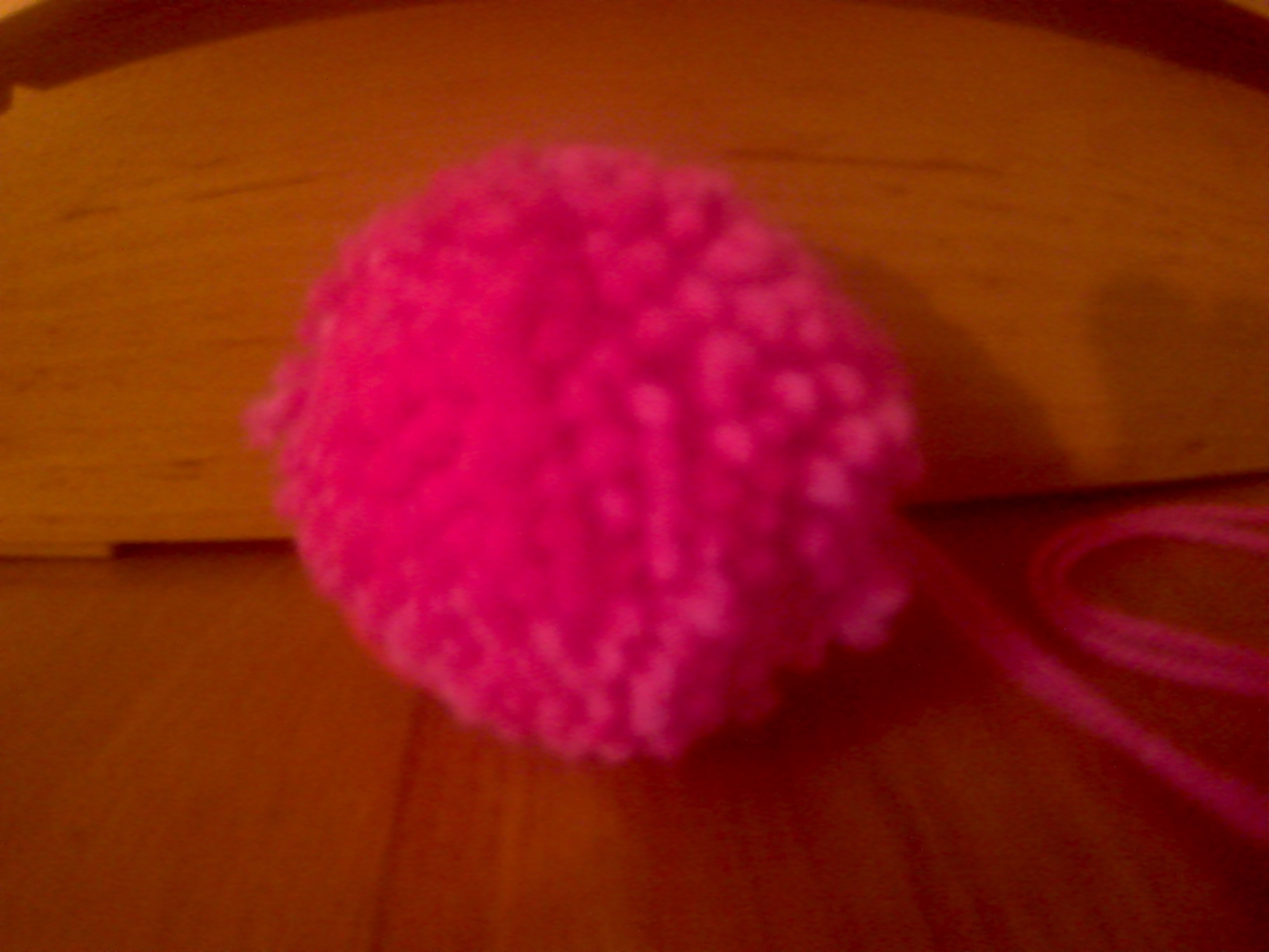 bambule